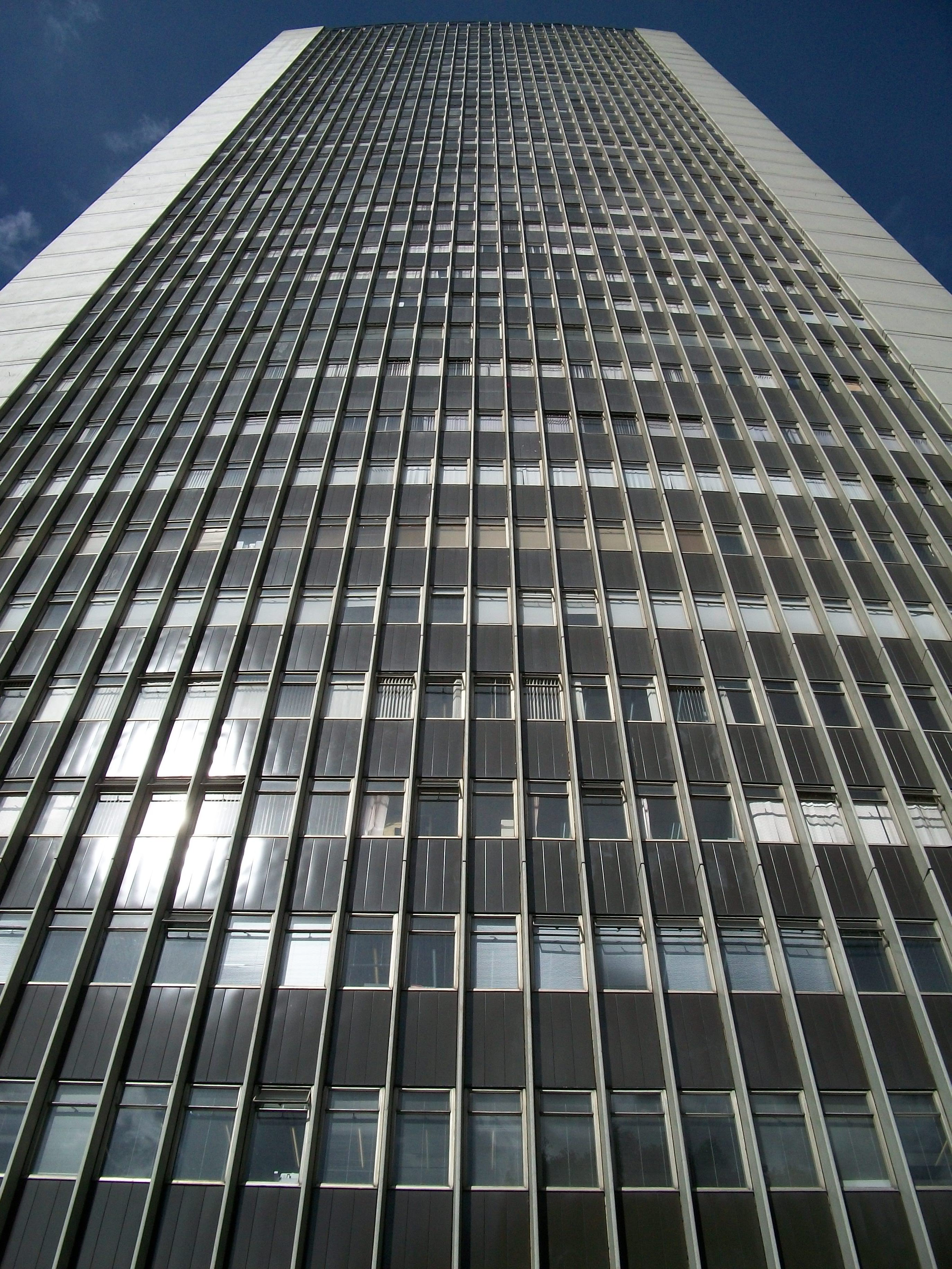 Costado sur del edificio Avianca. Bogotá, parque Santander.